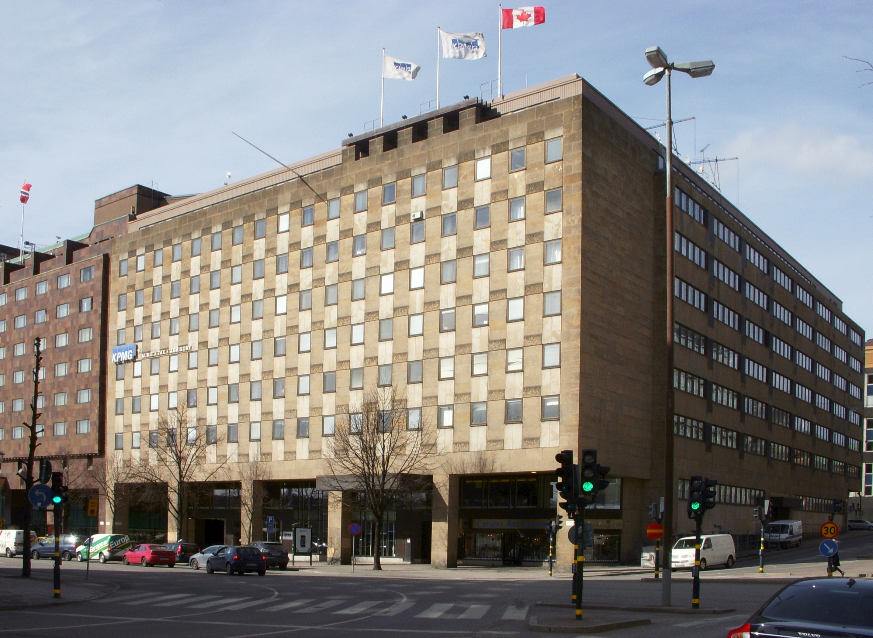 F.d. Kanadas ambassad i Stockholm (1972-2010), Tegelbacken 4 / Rödbodgatan. Byggt 1970-72. Arkitekt Erik Thelaus